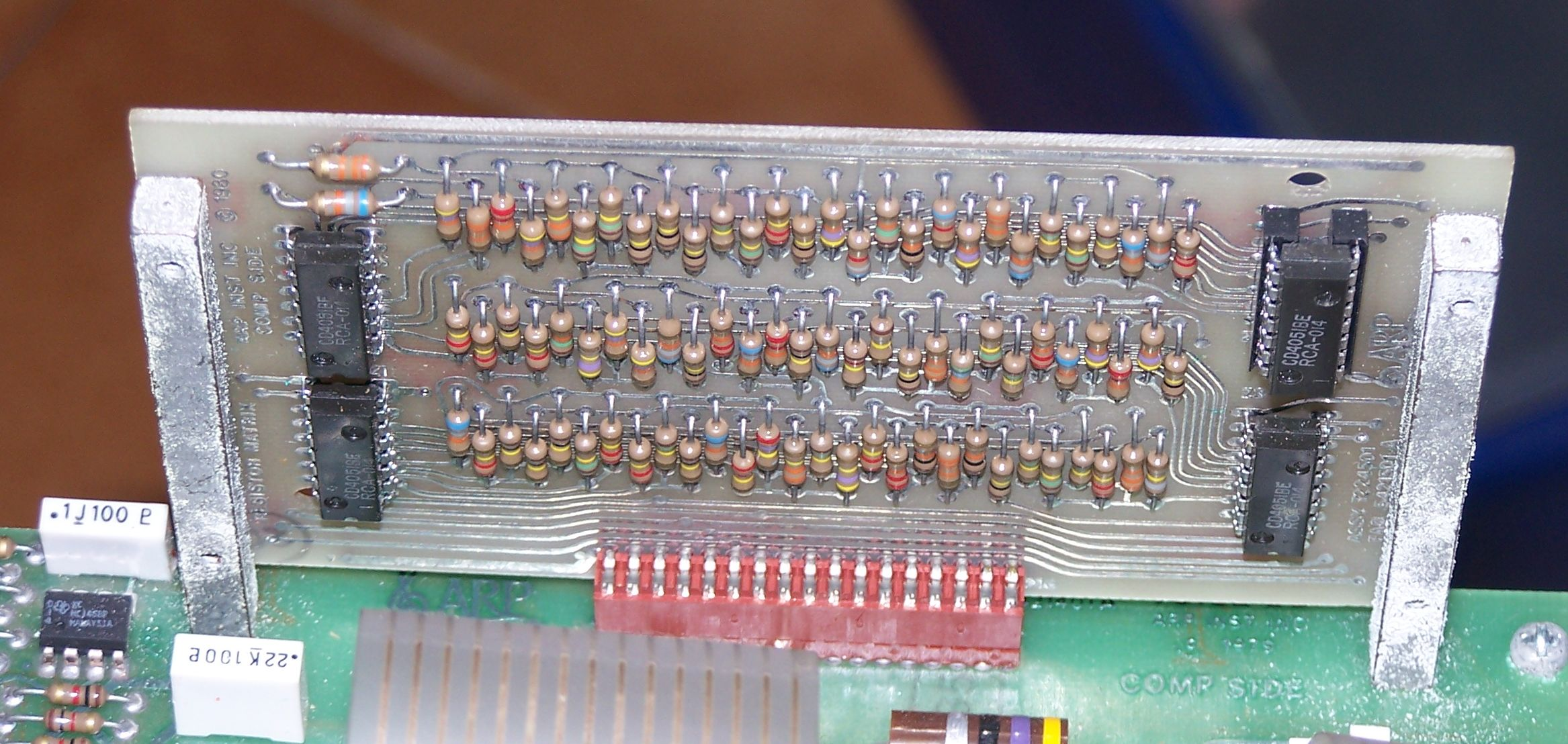 Scheda timbrica